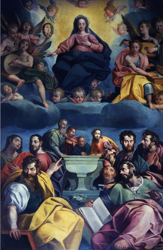 La obra representa la asunción a los Cielos de la Virgen María, madre de Jesucristo.